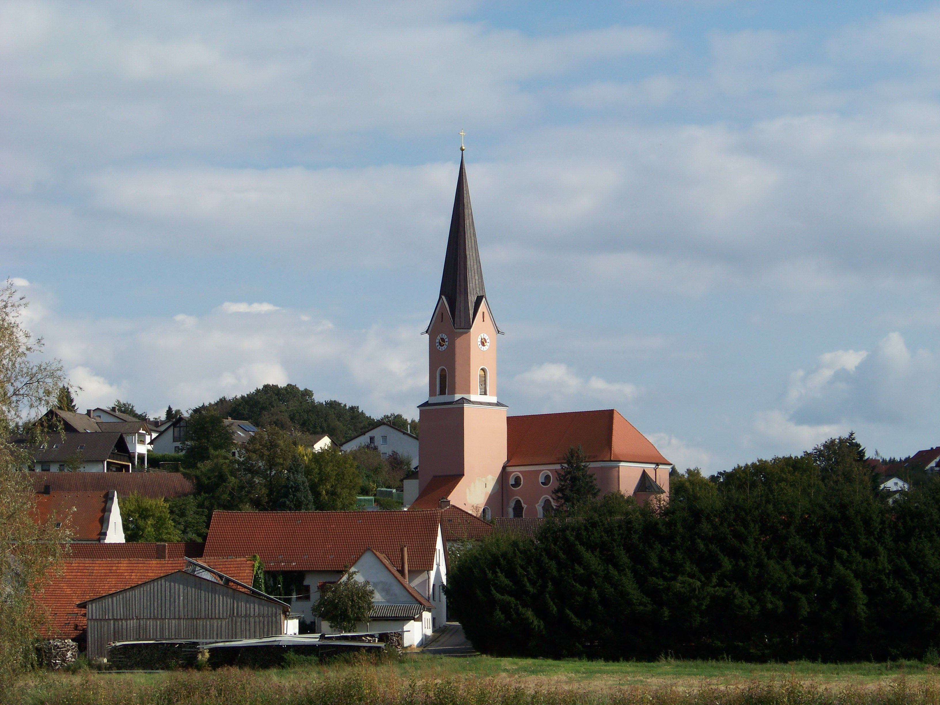 Rottenburg an der Laaber. Oberhatzkofen Schulweg 3. Katholische Pfarrkirche Mariä Himmelfahrt, barocke Anlage, 1743 von Johann Georg Hirschstötter errichtet; mit Ausstattung.